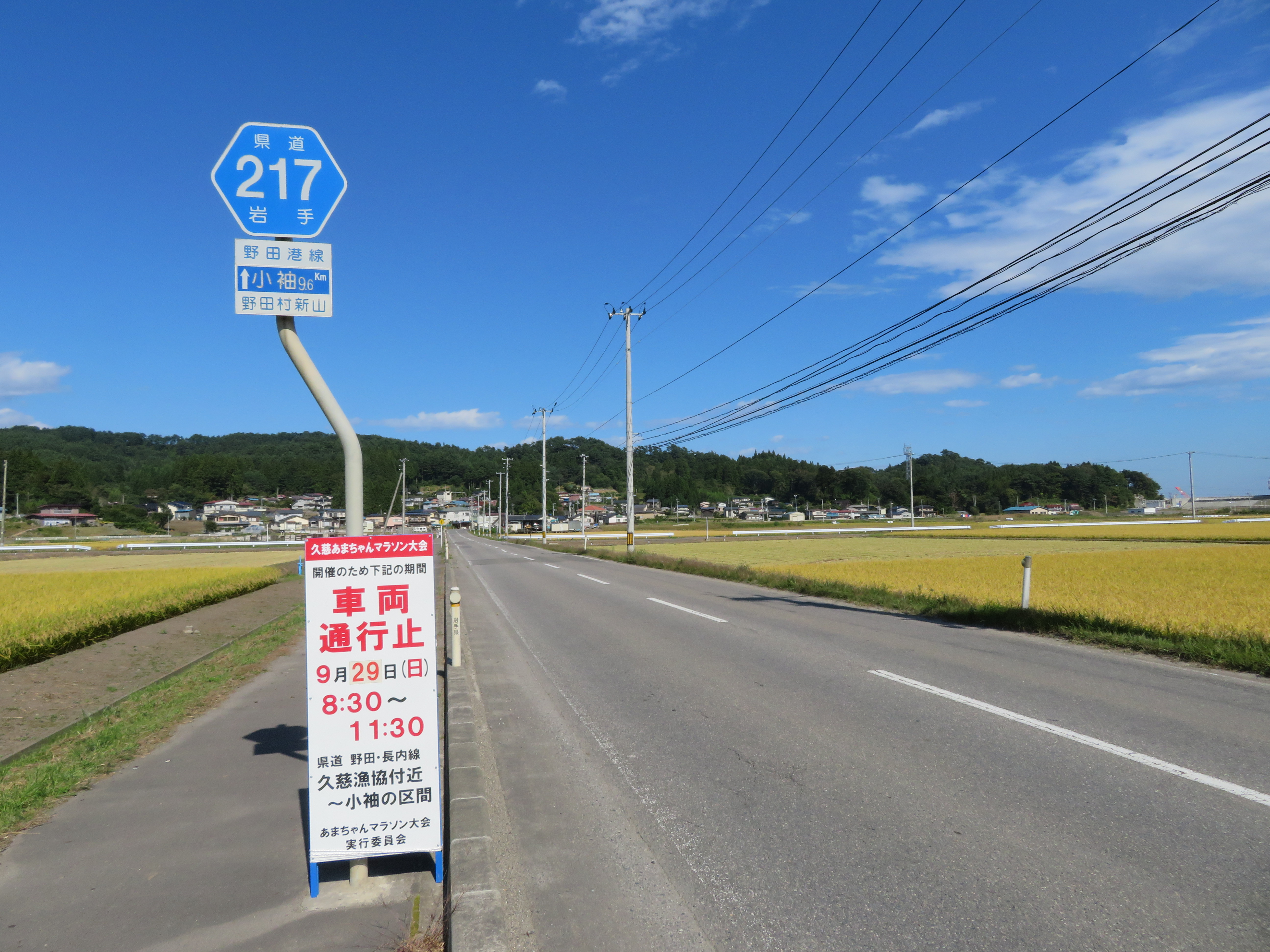 岩手県道217号線 野田村新山付近（野田港方面を撮影）